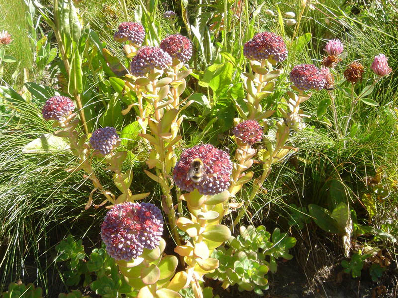 Sedum anacampseros